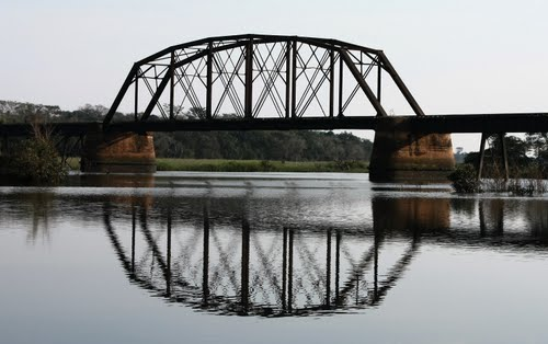 Puente ferroviario sobre el Río Pirapo.